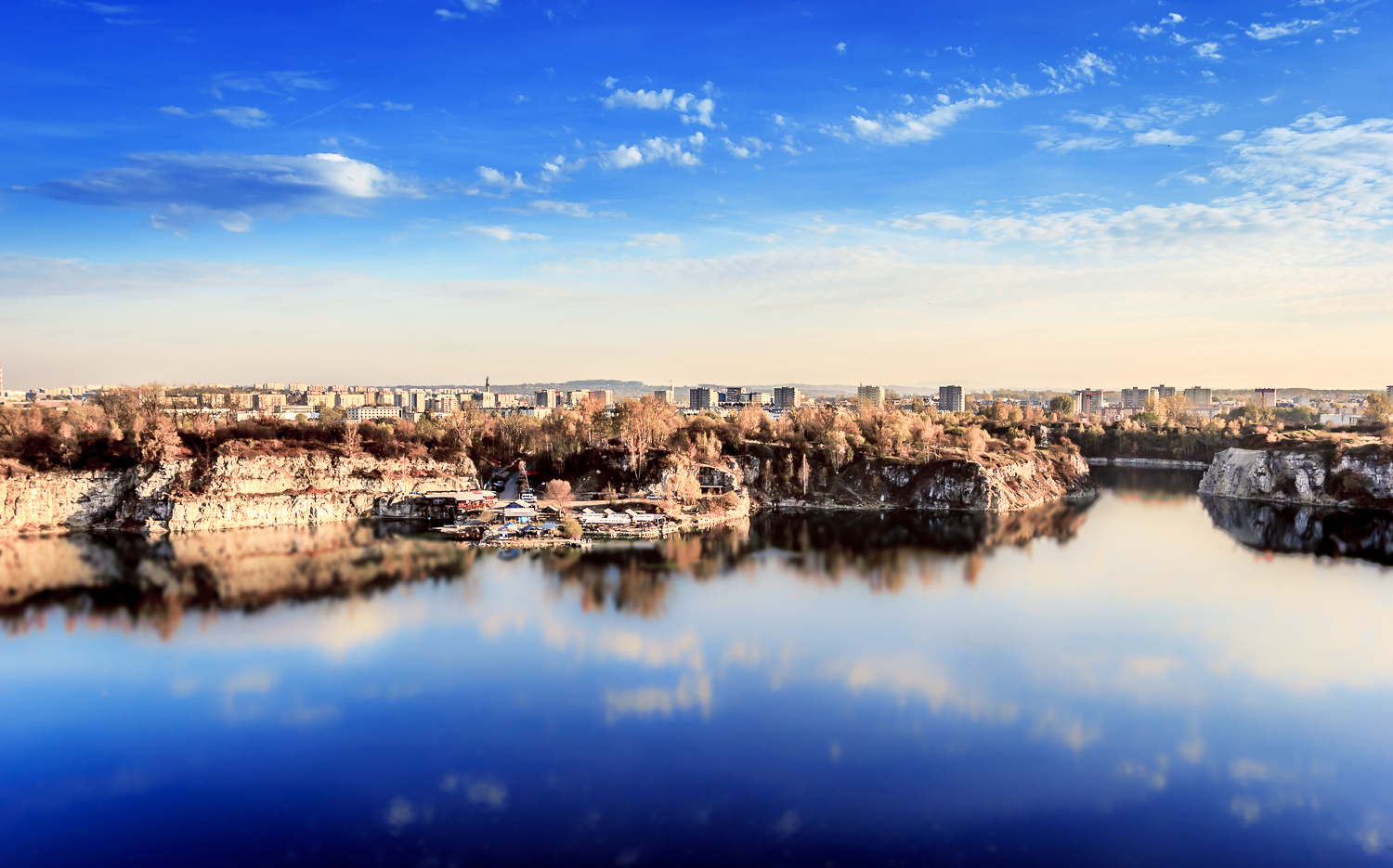 Park krajobrazowy Bielańsko-Tyniecki Park Krajobrazowy.